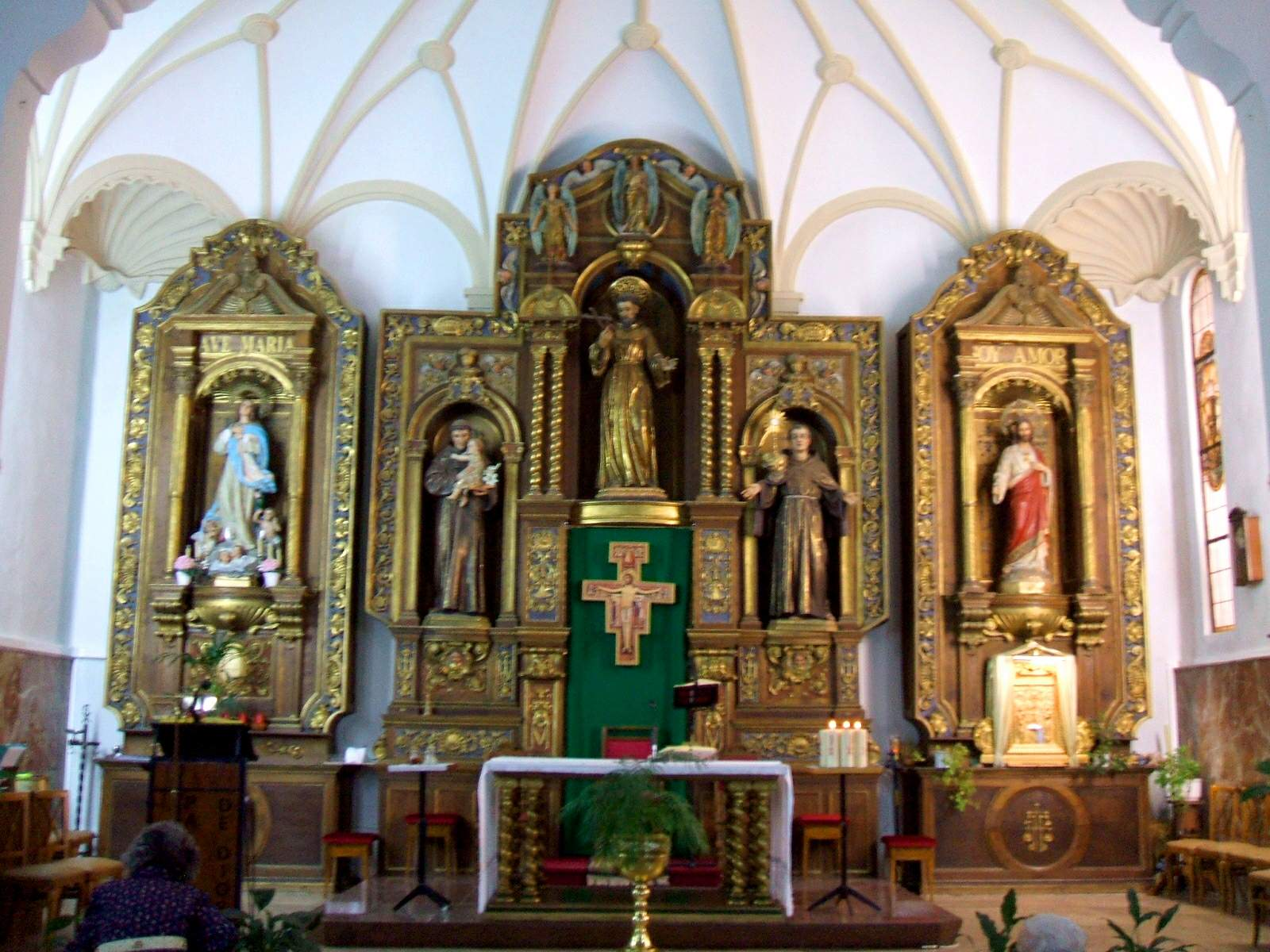 Iglesia de San José, de PP Franciscanos, en Soria